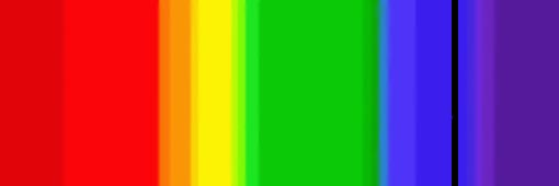 spectre d'un saphire bleu visible dans un spectroscope à réseau diffractant